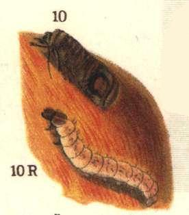 Codling moth (Cydia pomonella)